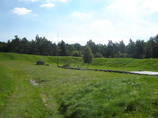 Vaade Kaarma maalinna siseõuele ja vallile